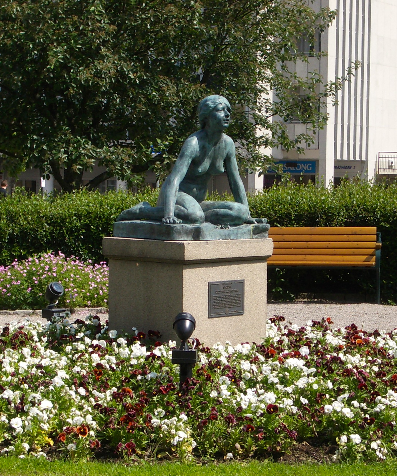 Grodan (franska: La Grenouille) är en skulptur av en sittande kvinnofigur. Den första skissen utfördes i gips av Per Hasselberg i Paris 1887. Skulpturen i Grodparken i Ulricehamn avtäcktes 1950 och gjöts i brons året innan på Herman Bergmans Konstgjuteri i Enskede. Grodan donerades av den lokala Rotaryklubben i Ulricehamn. På hösten 2008 stals skulpturen. En ny skulptur beställdes på Herman Bergmans Konstgjuteri och den kom på plats i december 2009.